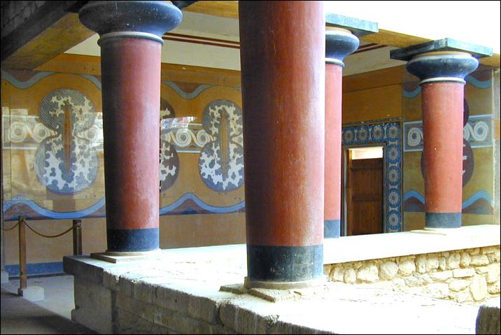 C'est un des puits de lumière qui permettaient l'éclairage des espaces internes de l'édifice.